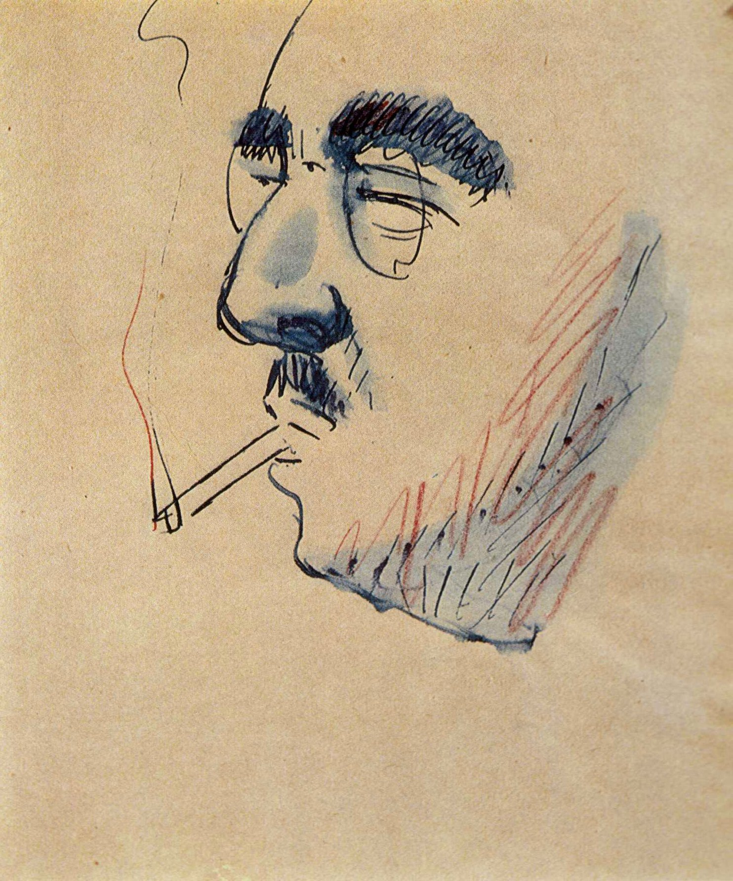 Arturo Stanghellini, Autoritratto scanner of old magazine